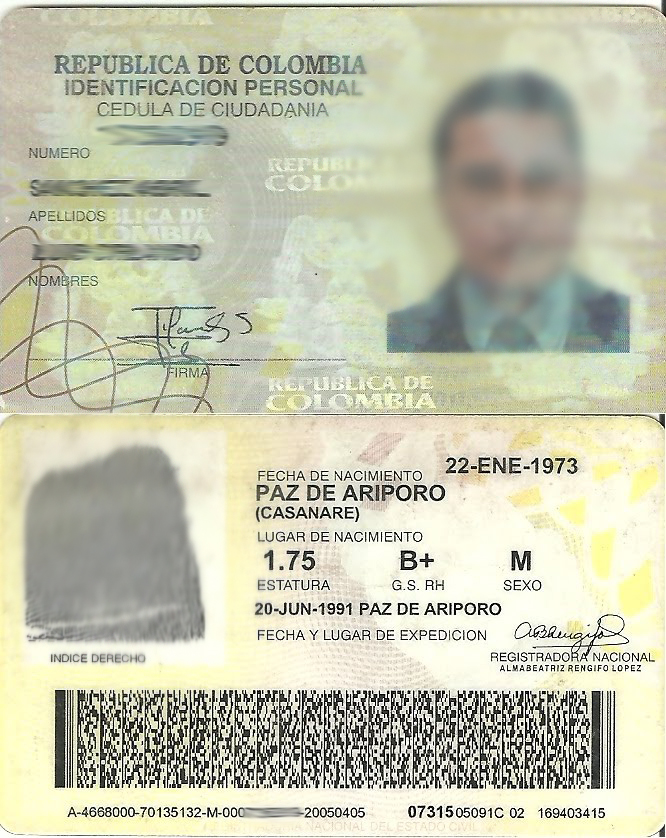 Desde el 2000, el Estado ha aprobado como la cédula de ciudadanía oficial la que en el momento pasará a ser obligatoria desde el 1 de enero de 2010